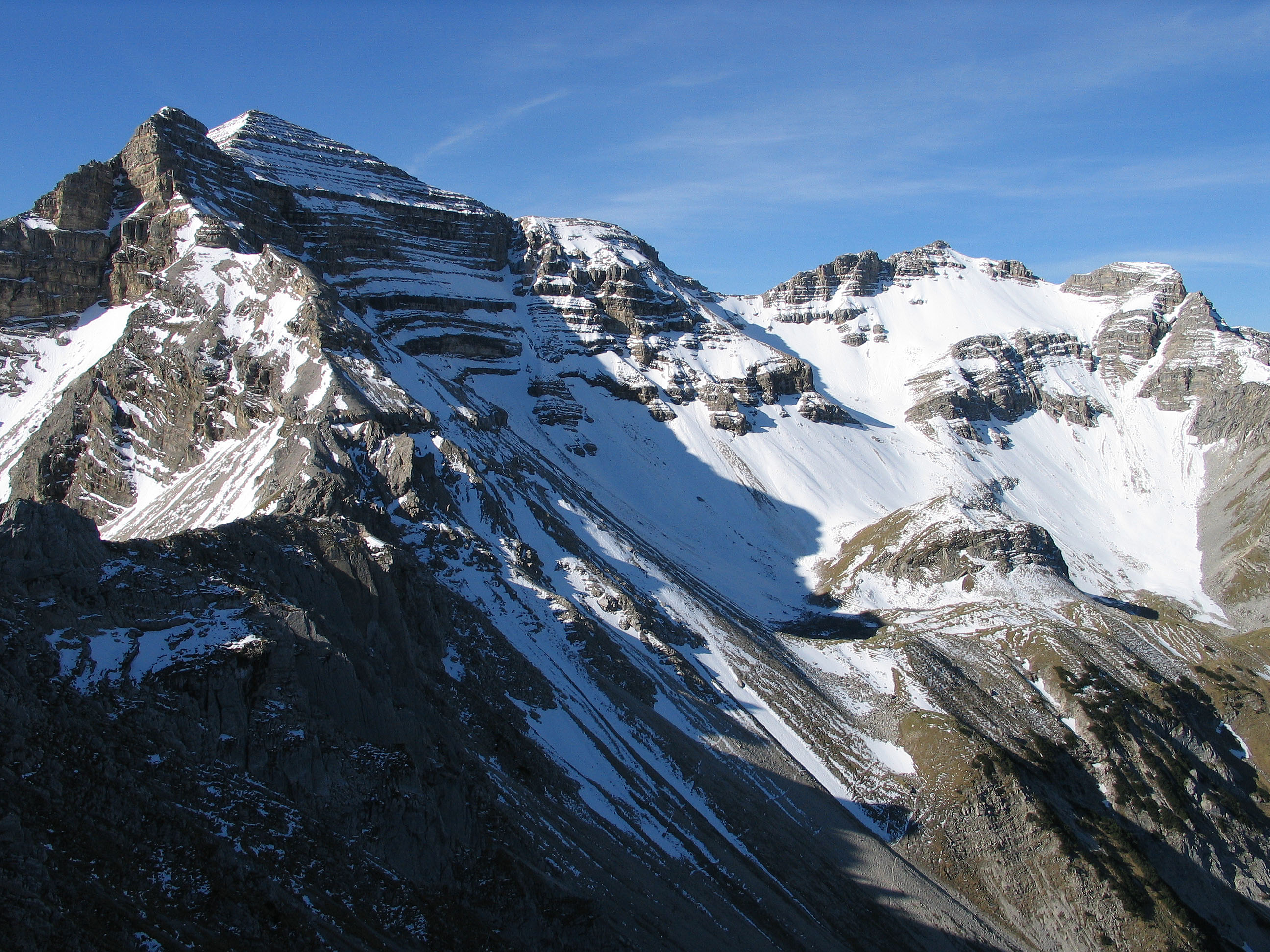 Soiernspitze (2257 m), Karwendel